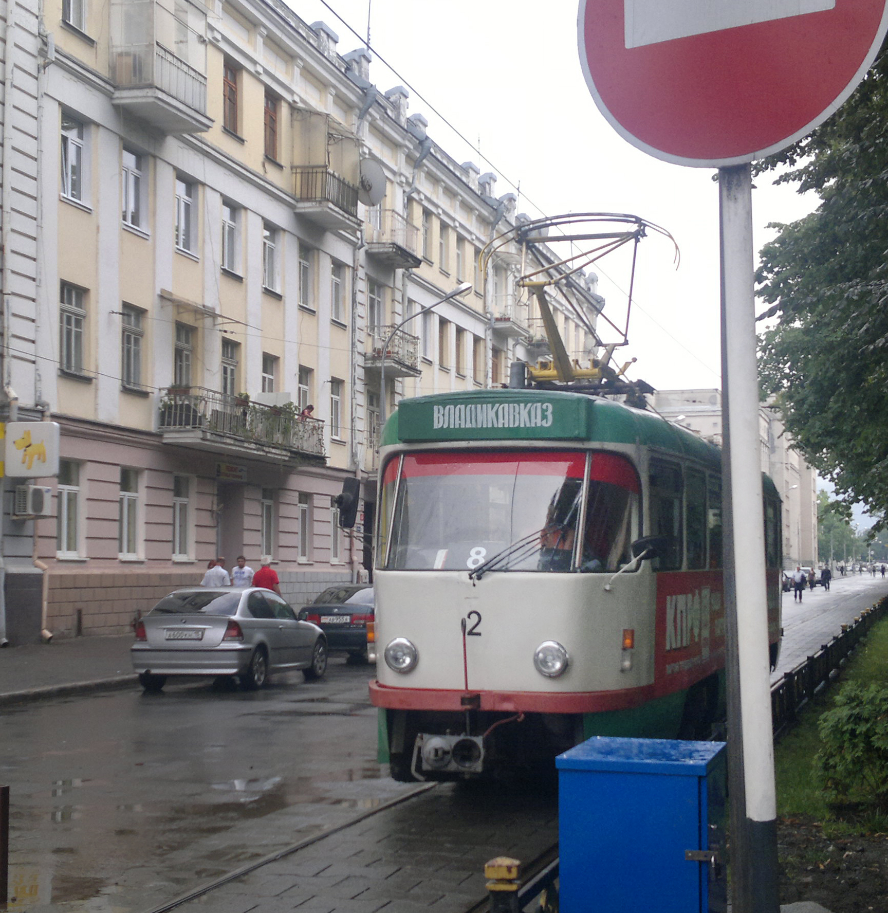 Маршрут №8 Владикавказского трамвая